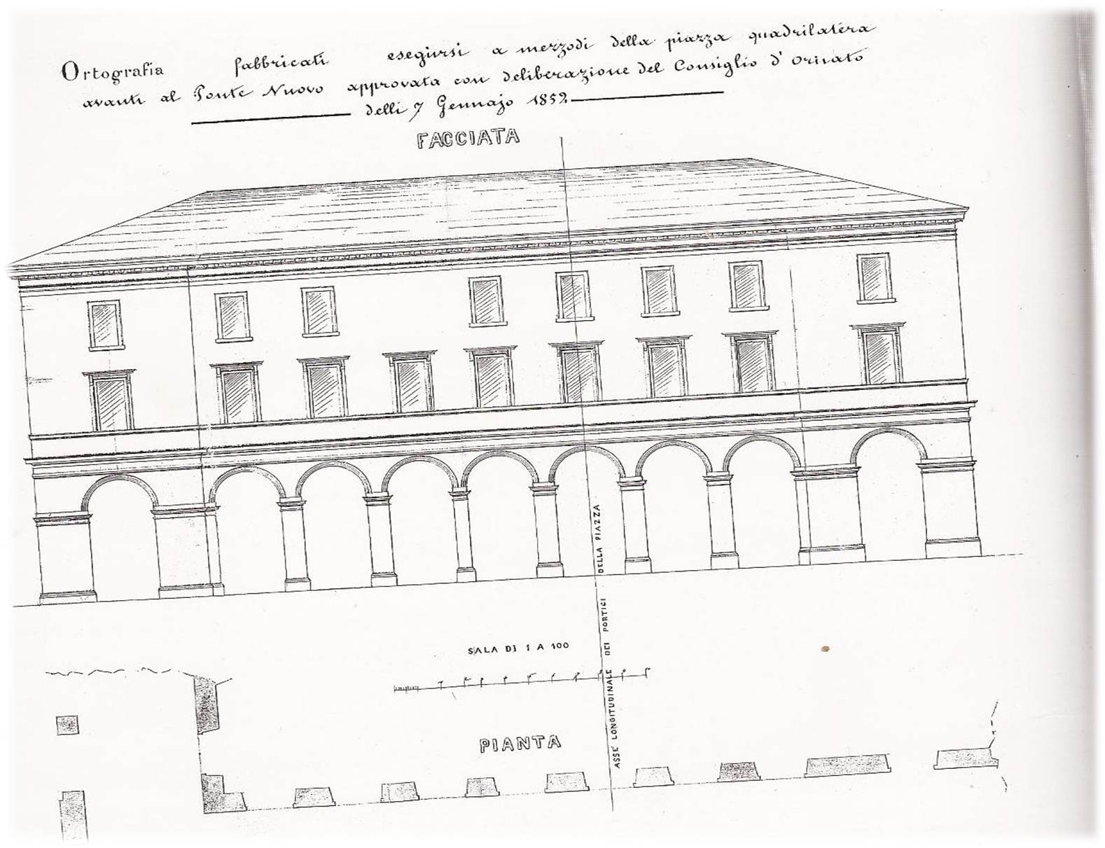 Type d’immeuble voulu par le Consiglio d’Ornato avec les portiques qui faisaient partie du projet de Joseph Vernier.